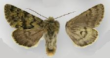 Lasionycta uniformis multicolor male